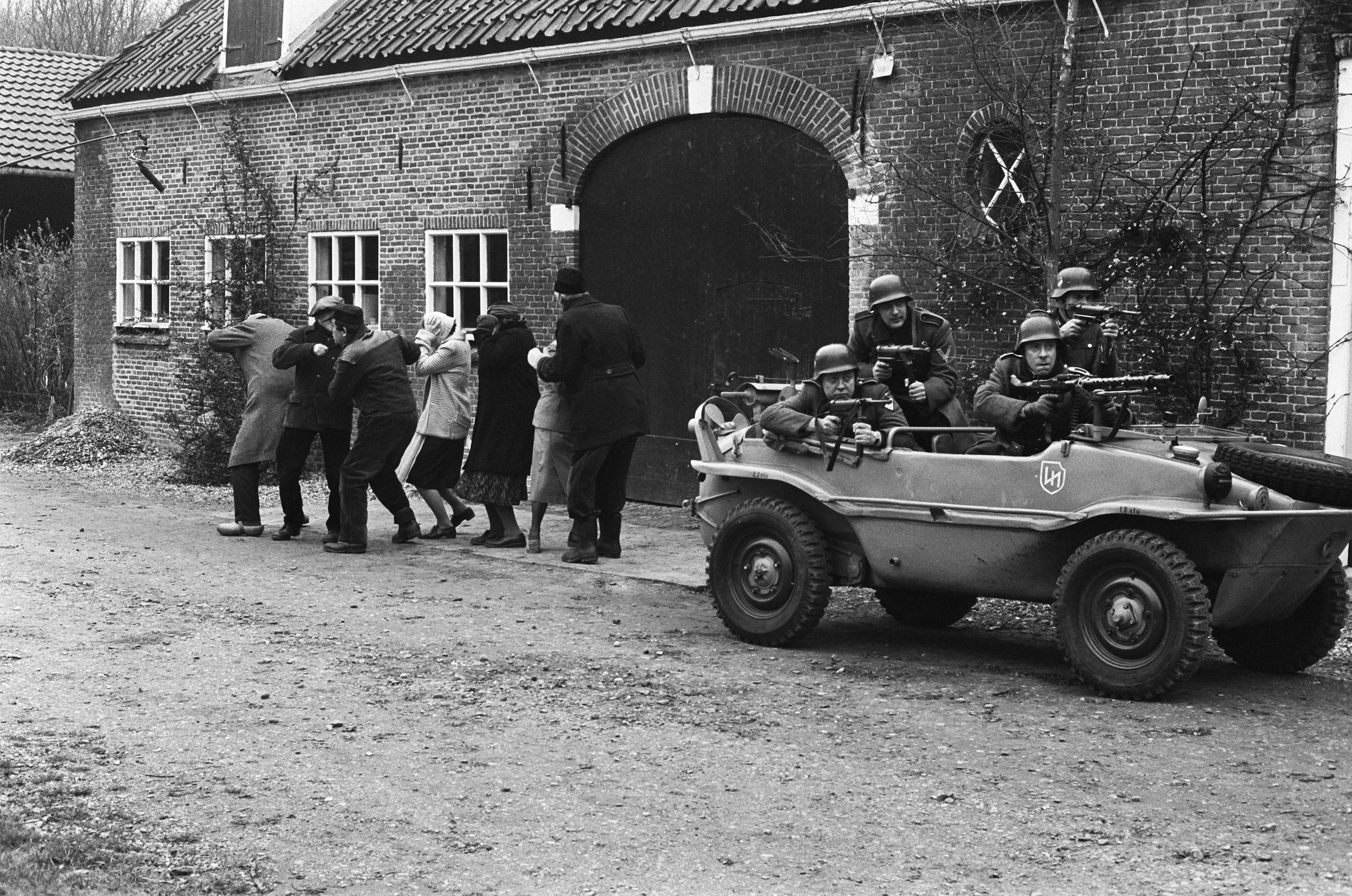 Collectie / Archief : Fotocollectie Anefo Reportage / Serie : [ onbekend ] Beschrijving : "Oorlogswinter" van Jan Terlouw verfilmd door de VARA; mensen worden weggevoerd door Duitse soldaten, tijdens opnamen in Laag Zuthem Annotatie : Als Duitse soldaten: Tim Beekman (links voor) en Arnoud Gelderman (rechtsvoor) Datum : 14 maart 1975 Locatie : Laag Zuthem, Raalte Trefwoorden : acteurs, televisiedrama's, werkopnamen Persoonsnaam : Beekman, Tim, Gelderman, Arnold Fotograaf : Peters, Hans / Anefo Auteursrechthebbende : Nationaal Archief Materiaalsoort : Negatief (zwart/wit) Nummer archiefinventaris : bekijk toegang 2.24.01.05 Bestanddeelnummer : 927-8047